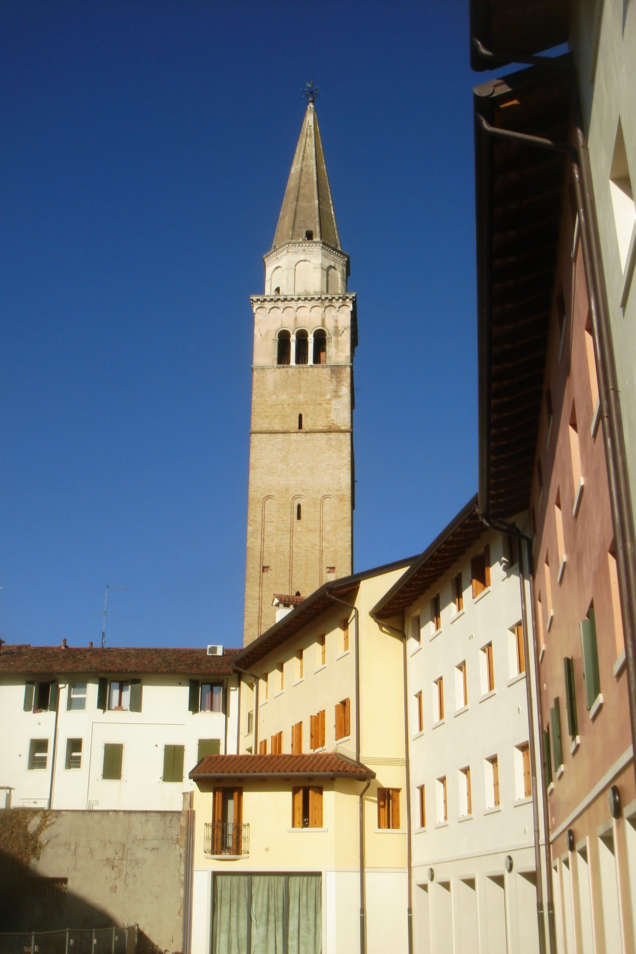 Foto di Paolo Steffan